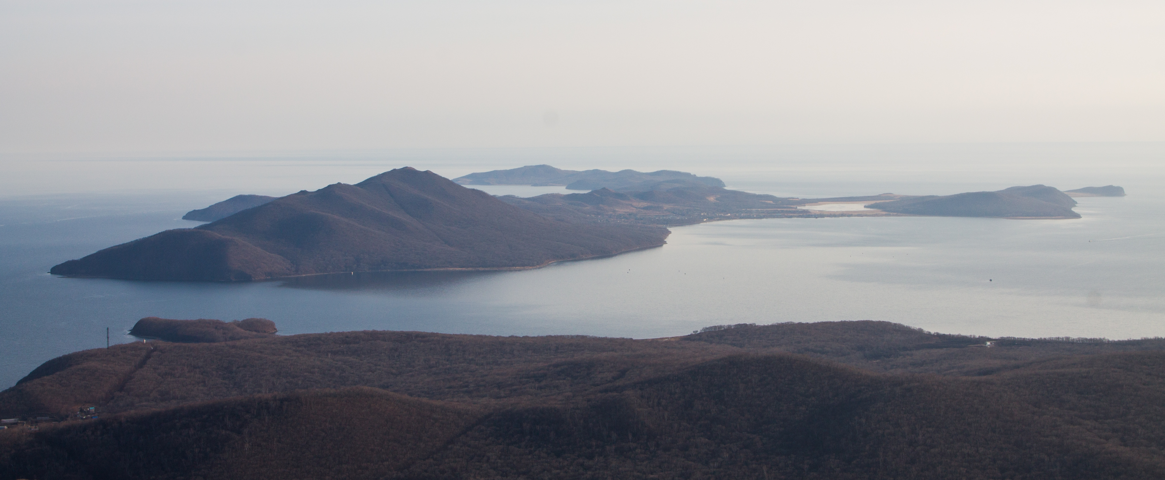 Остров Путятина с горы Большой Иосиф